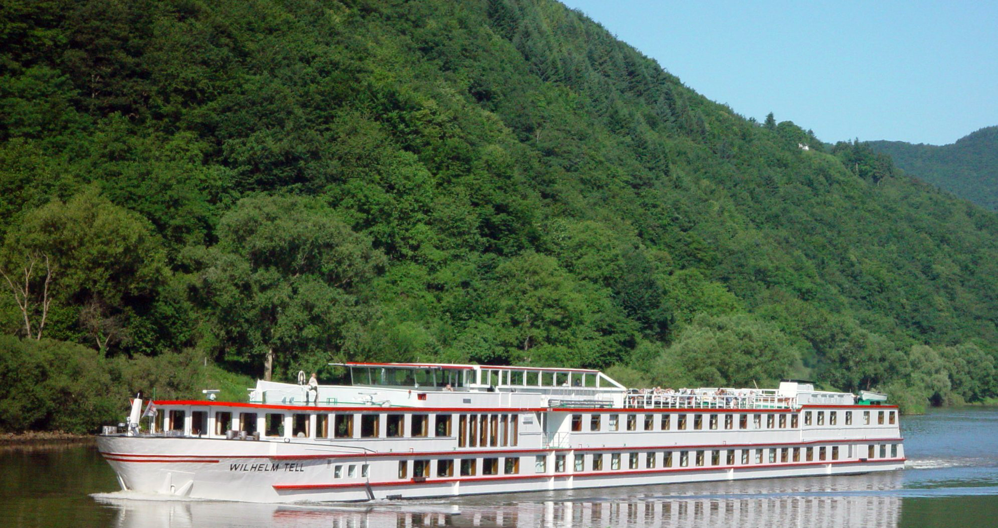 Wilhelm Tell auf Fahrt